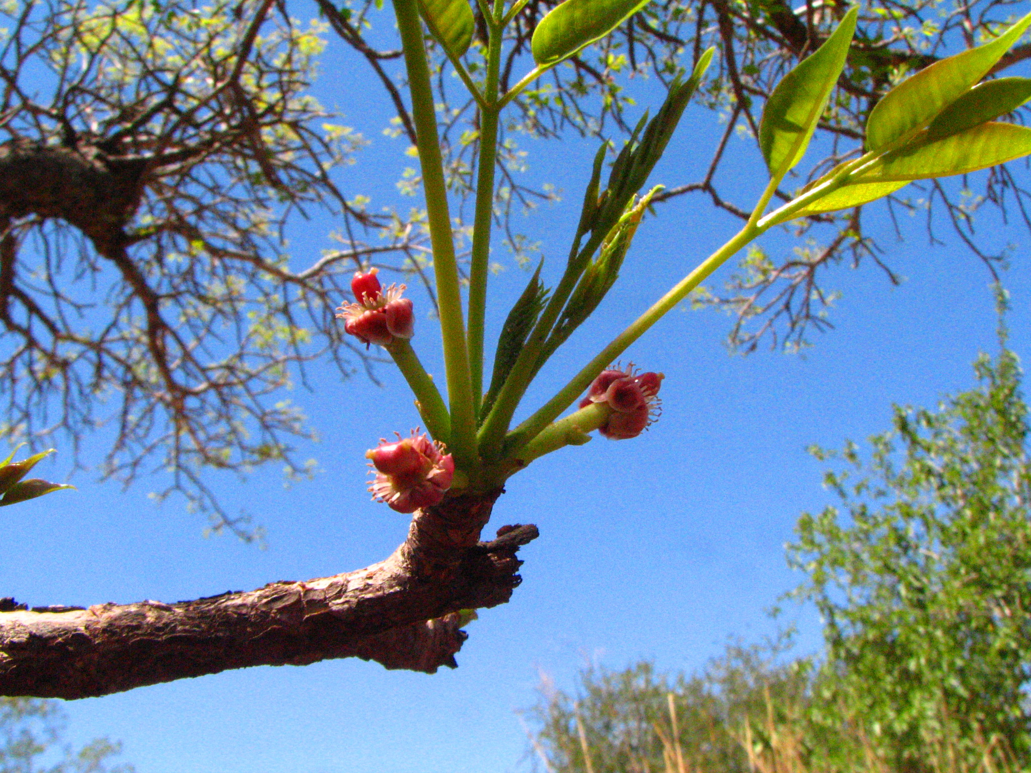 Aantreklike Maroelaboomblomme in sentraal-Eswatini